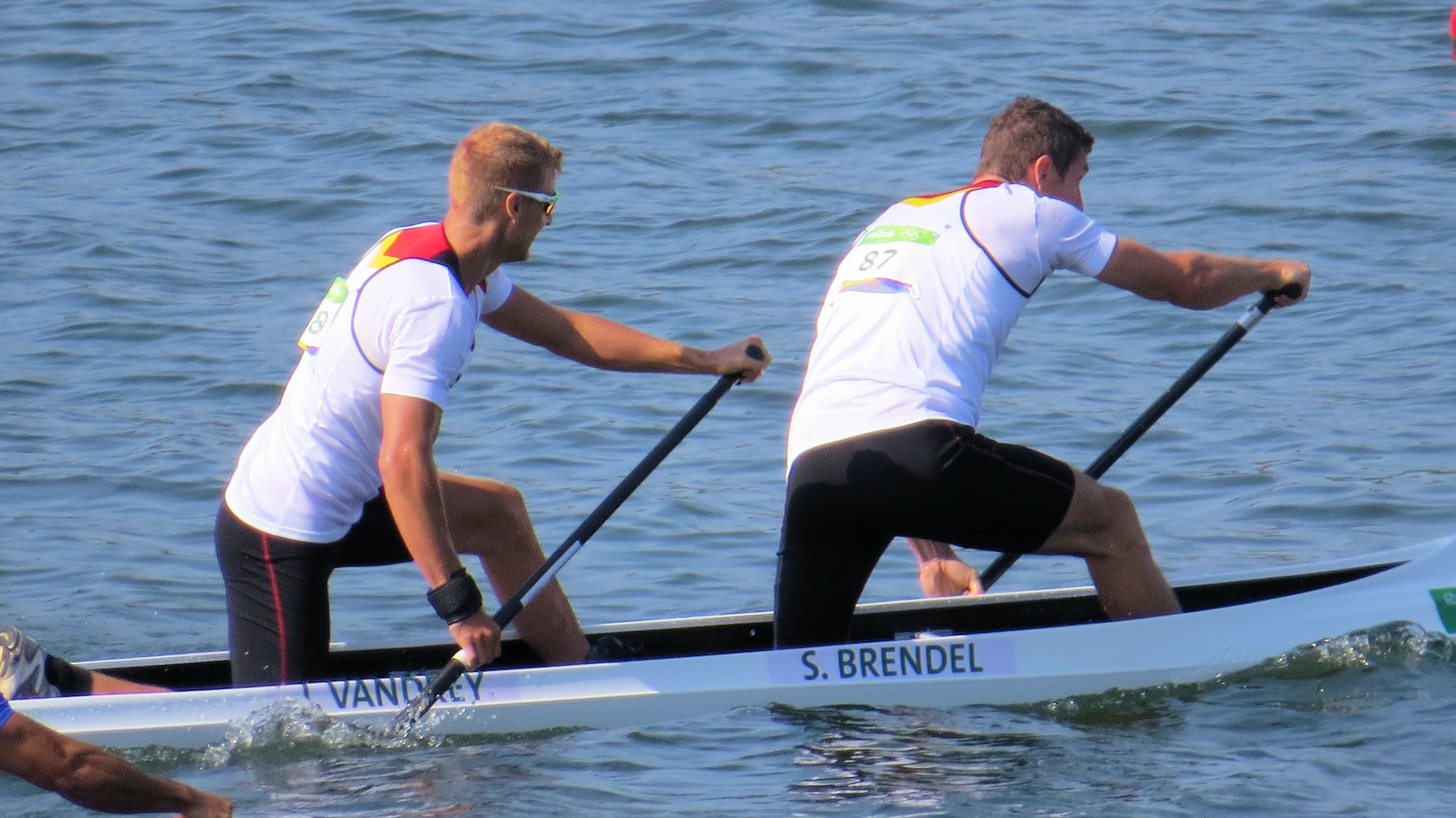 Sx50